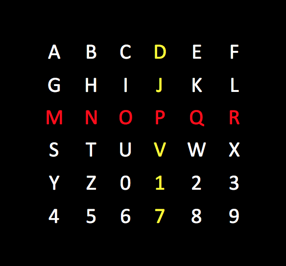 Exemple interfície gràfica del lletrejador BCI durant el seu funcionament. En groc, es mostra un exmeple d'il·luminació i en vermell la que s'il·lumina en un instant posterior.